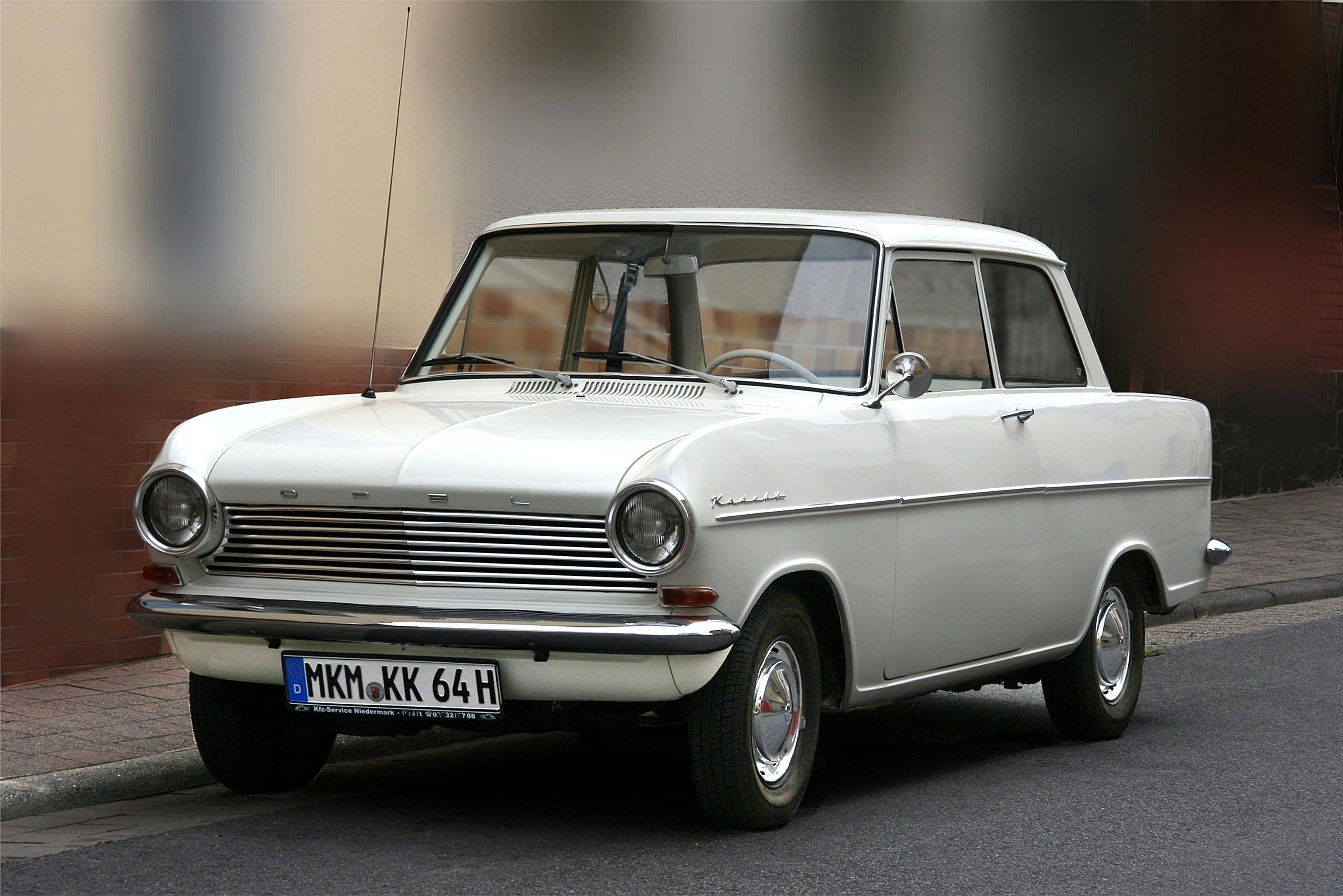 Opel Kadett A, Baujahr 1964 (Fantasiekennzeichen)